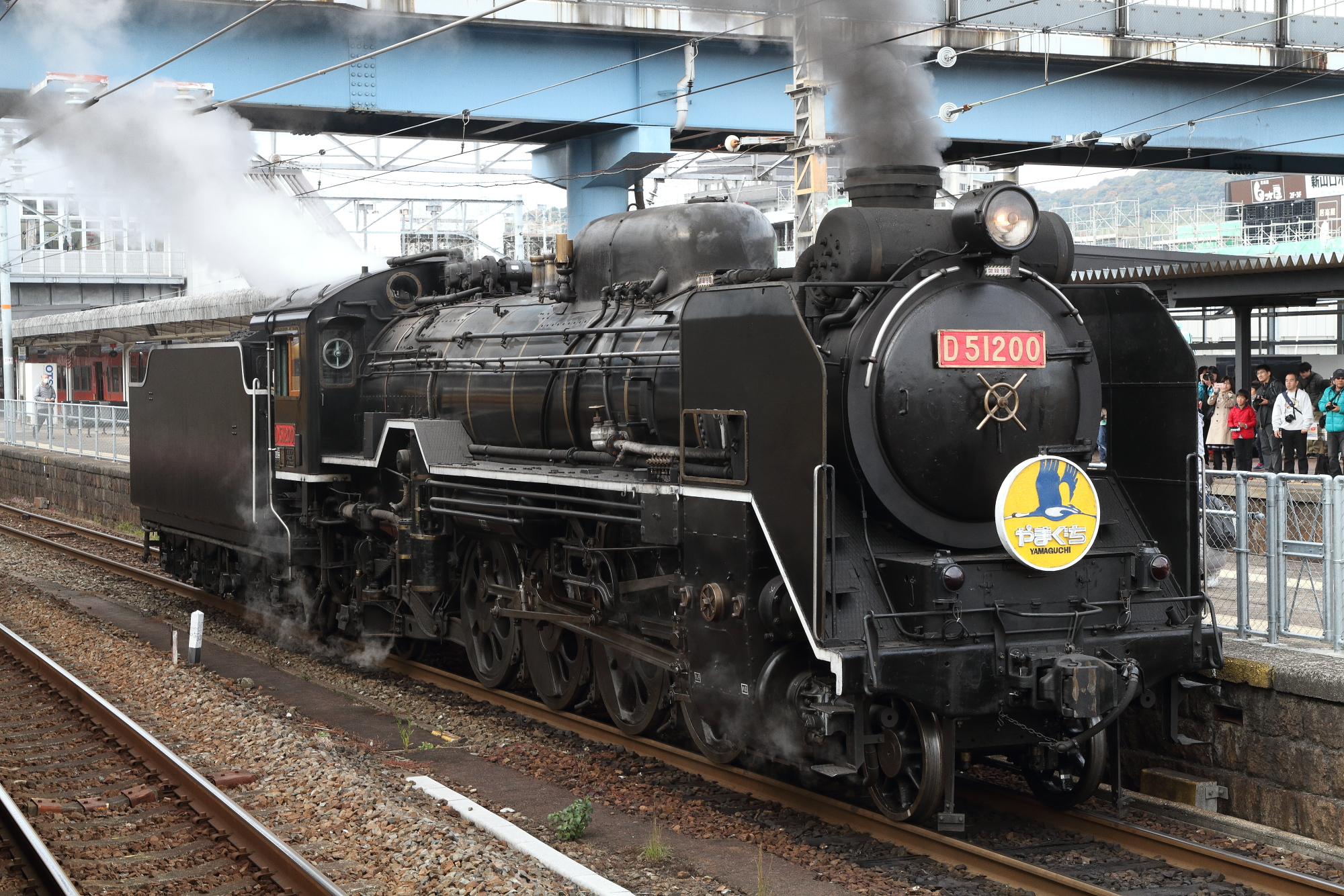 本線復活当日のD51 200。ナンバーが赤色。